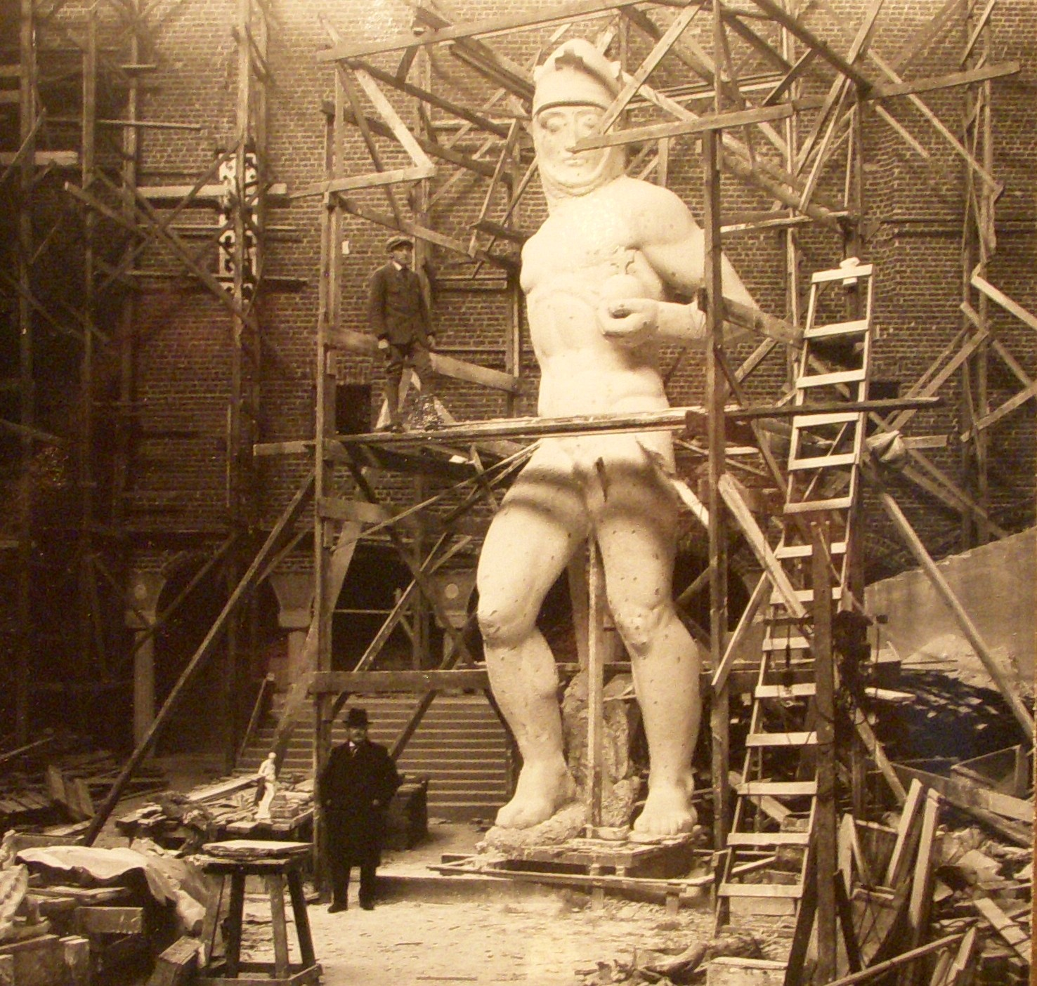 S:t Eriksstatyn modelleras i "Blå hallen" i Stockholms stadshus